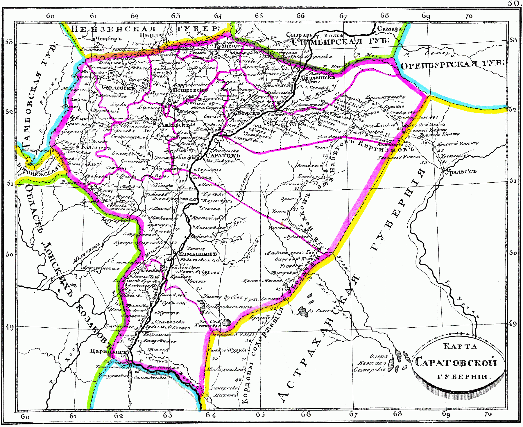 Карта Саратовской губернии, 1835